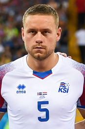 Сборная Исландии уступает Хорватии и покидает ЧМ-2018